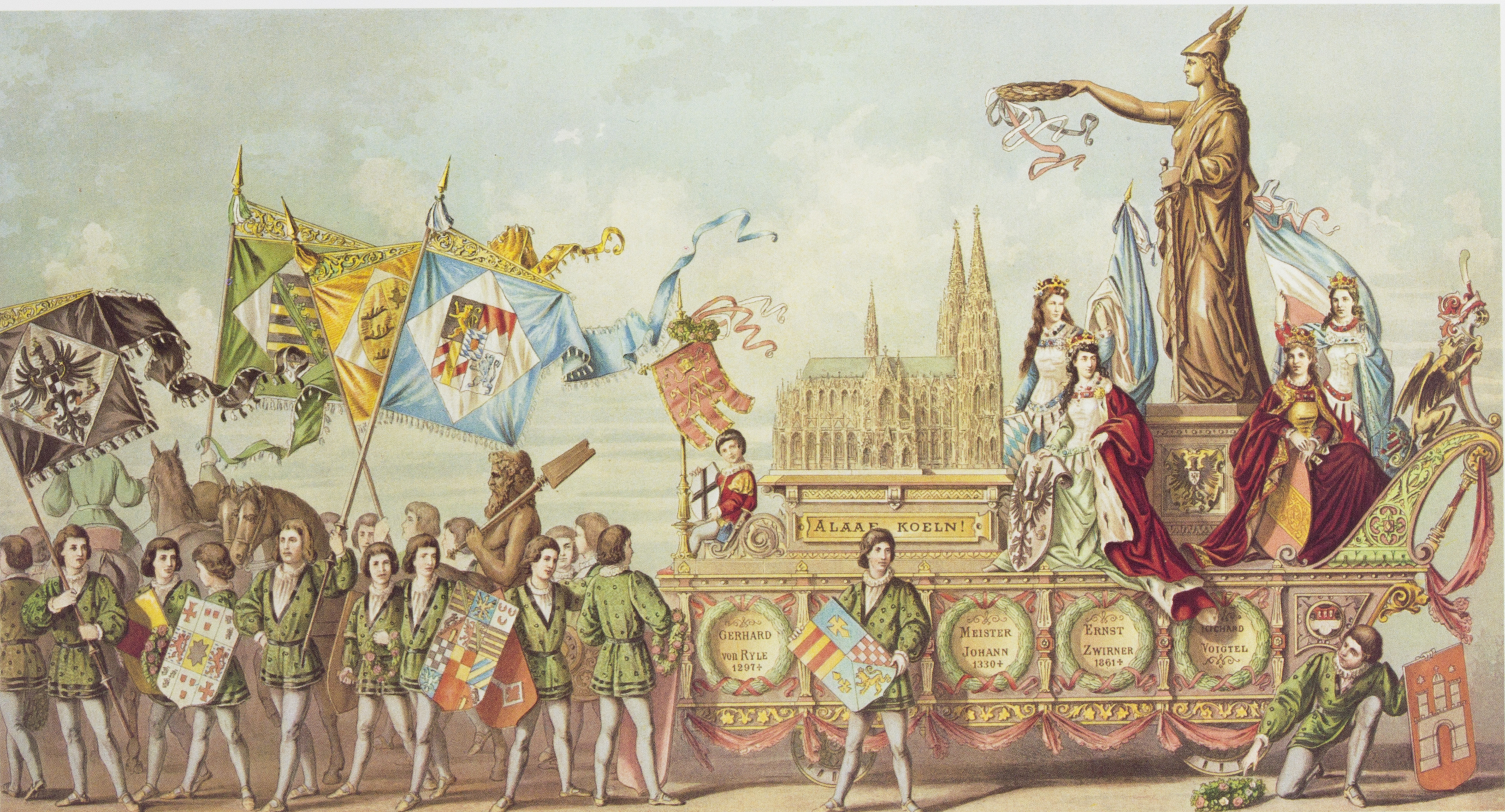 Tony Avenarius: Historischer Festzug veranstaltet bei der Feier der Vollendung des Kölner Doms am 18. October 1880. Tafel XXVIII